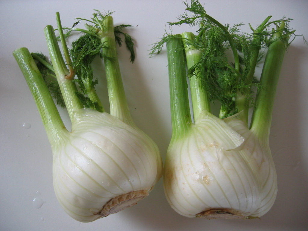 Fenouil